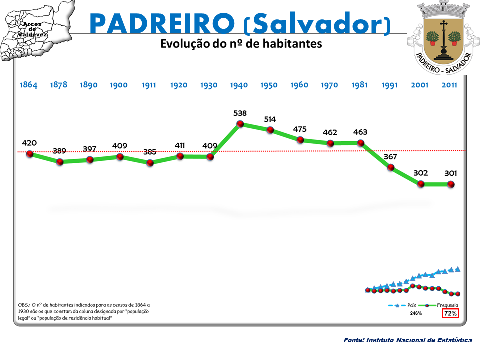 Censos 1864/2011